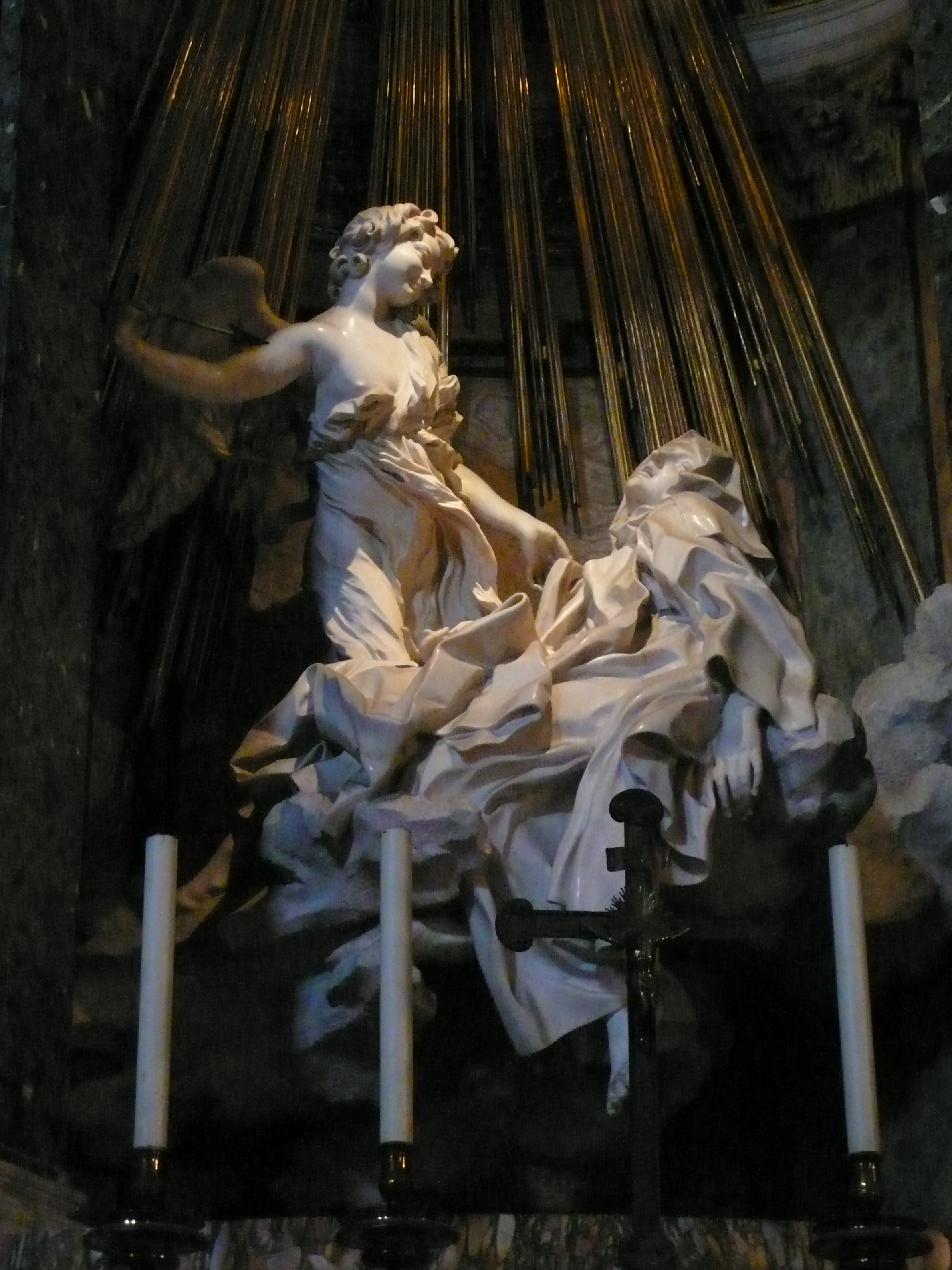 Die Verzückung der Hl. Teresa von Avila, Bernini, Santa Maria della Vittoria, Rom